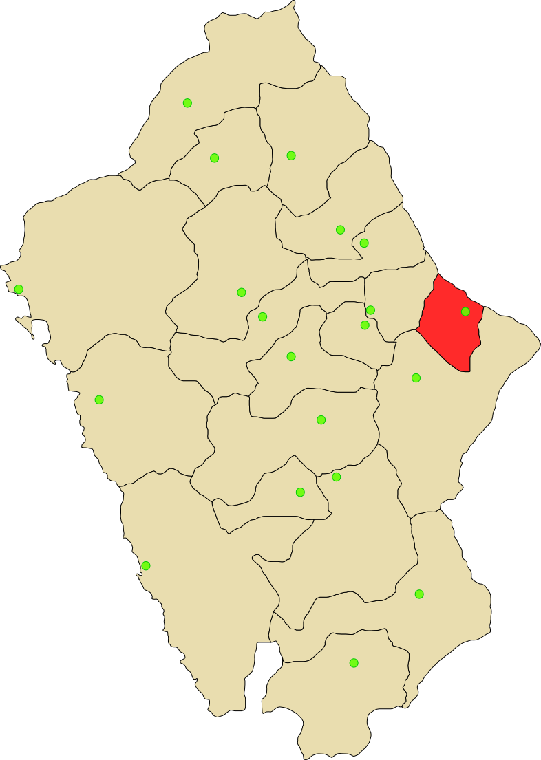 Provincia de Antonio Raymondi de depatamento Ancash